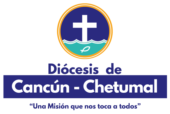 Logo de la Diócesis de Cancún-Chetumal, México